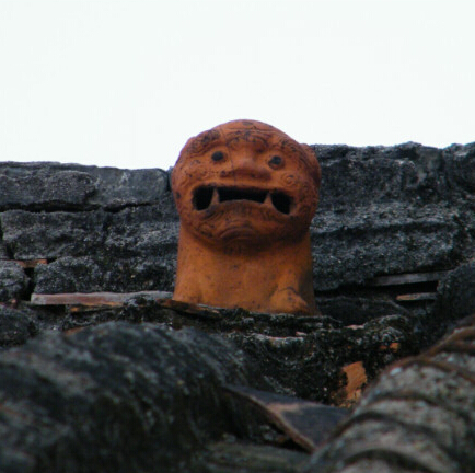 中文（中国大陆）: 广东省汕头市达濠老厝厝顶的风狮